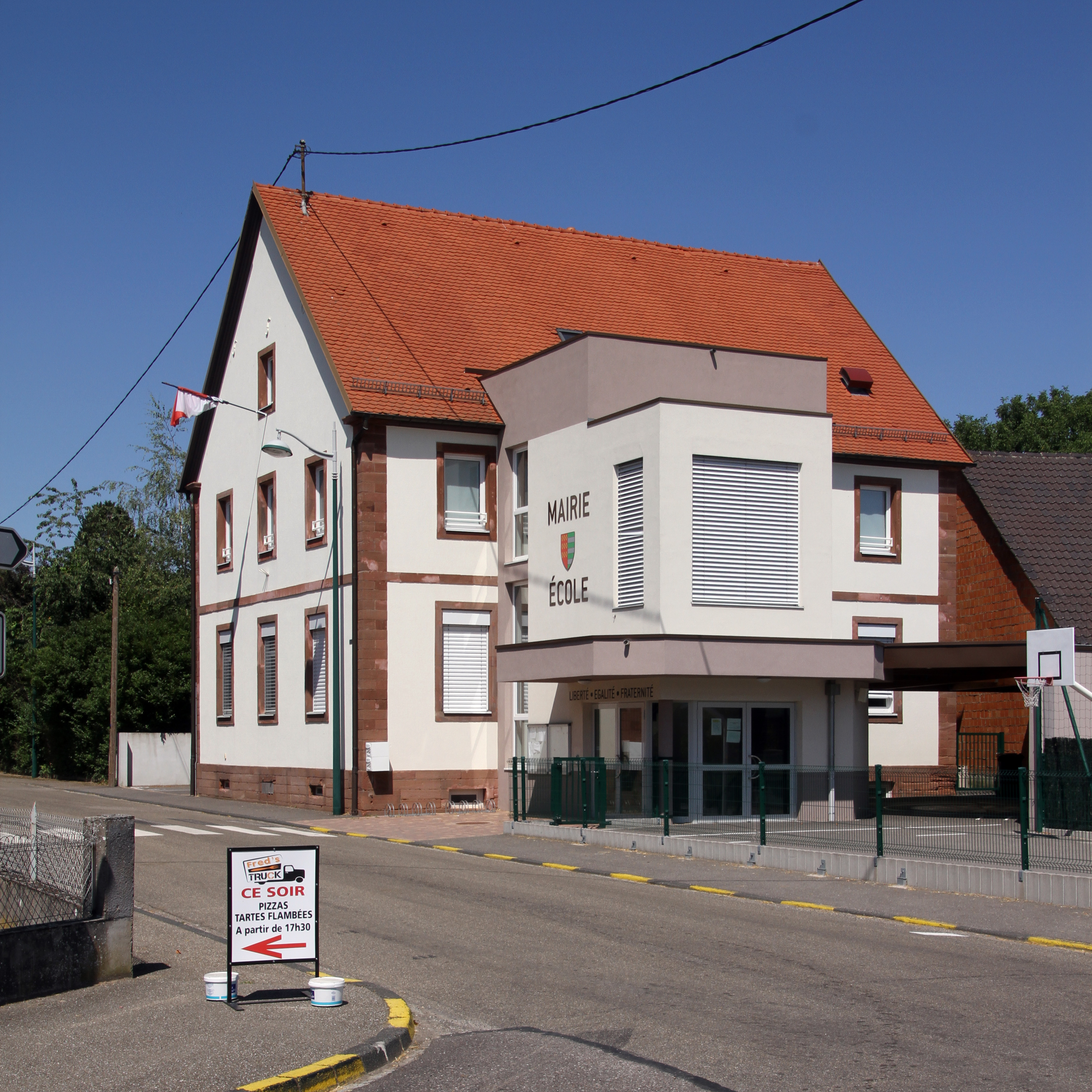 Rathaus in Oberlauterbach.